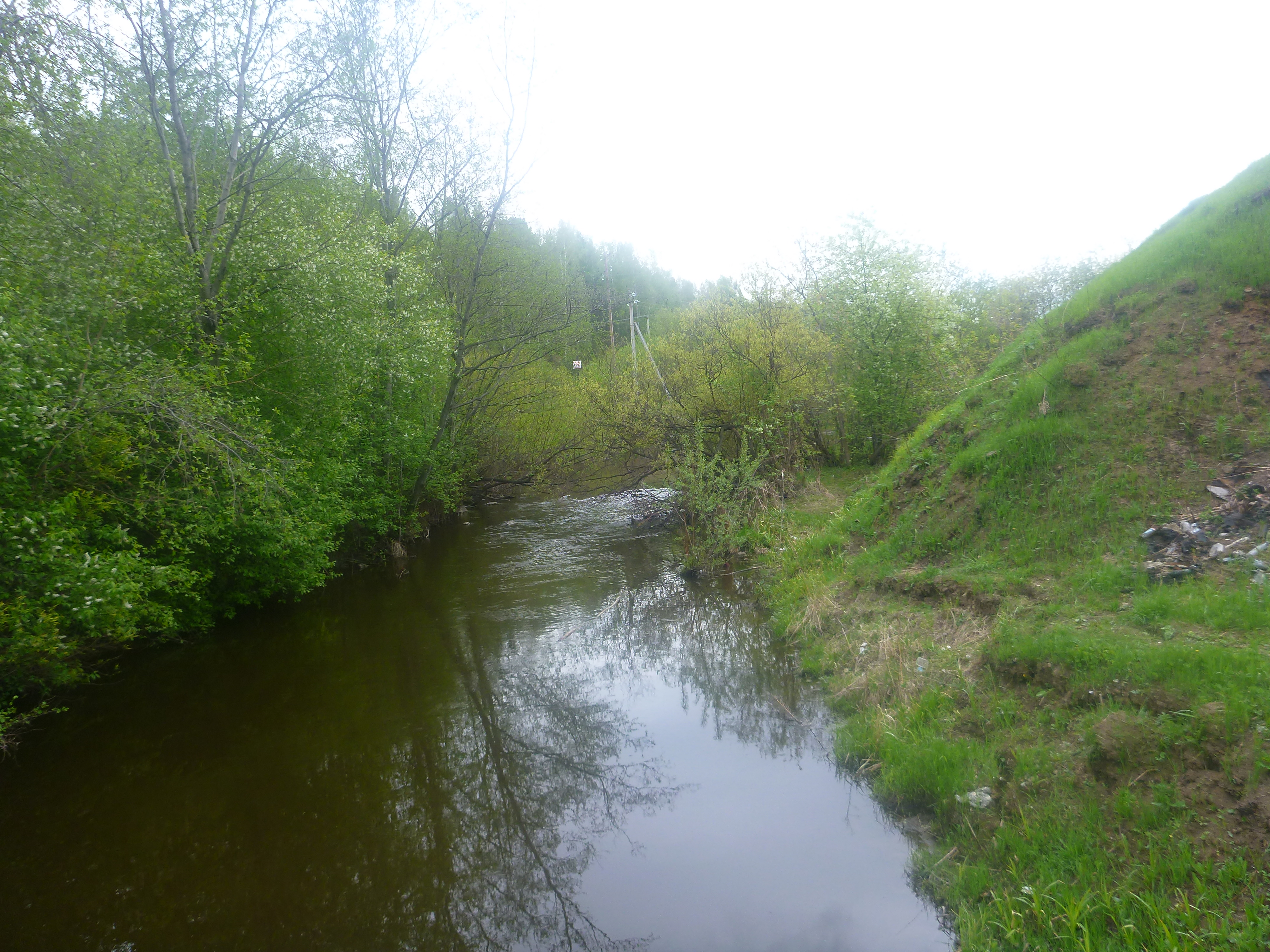 Шлюз 1 плотины Уктусского завода 1702 года и река Уктусска (Патрушиха)